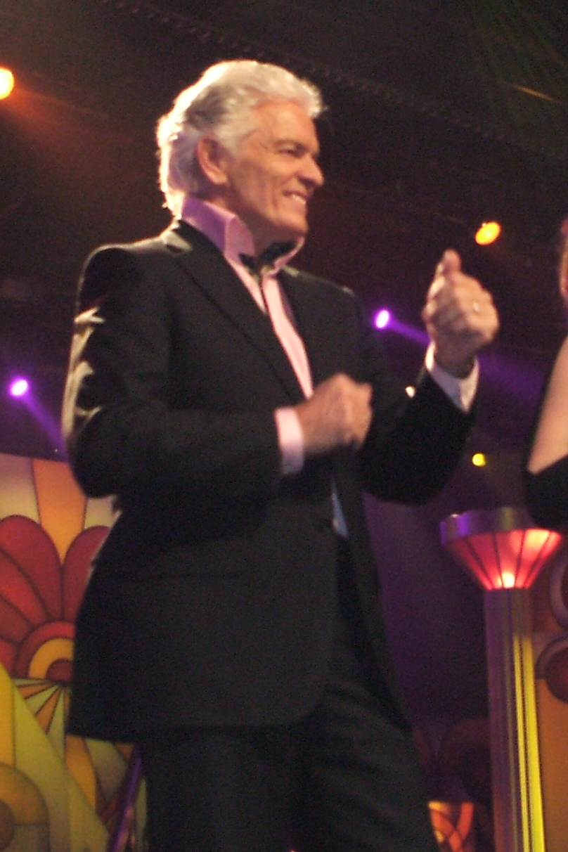 Pauzenummer tijdens het Nationaal Songfestival 2011 Ben Cramer